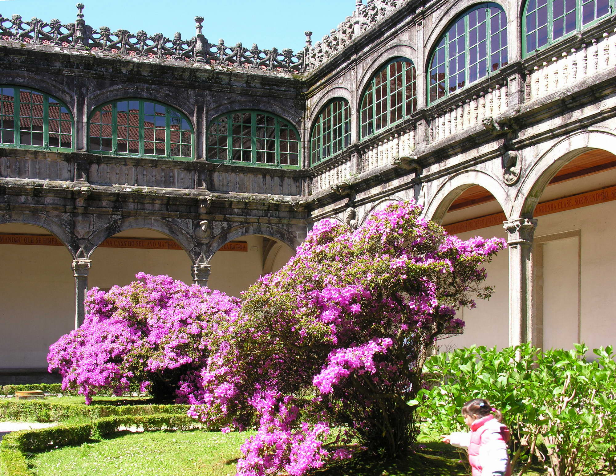 self made. Santiago de Compostela, Galicia, Spain.